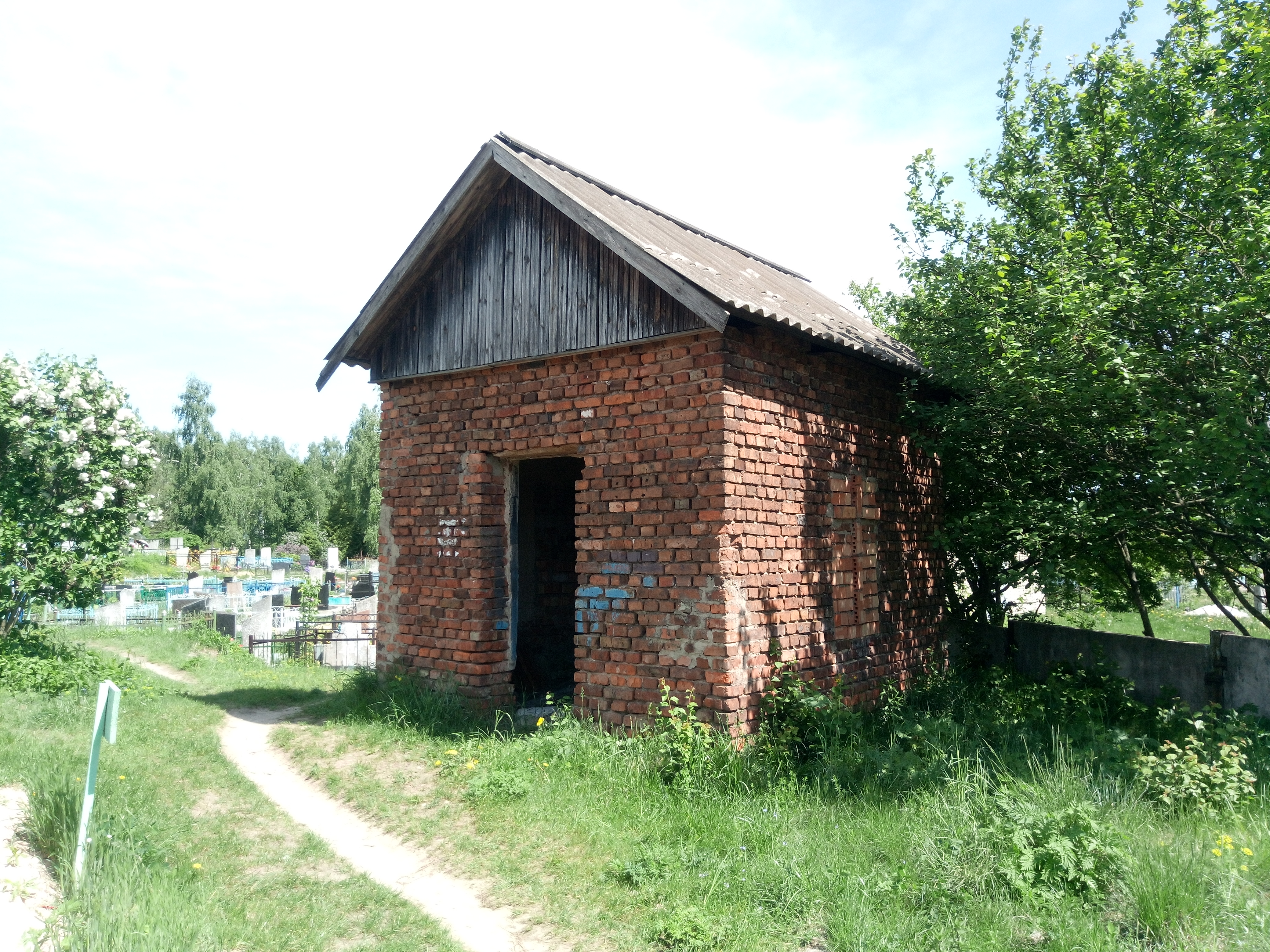 Будынак на могілках